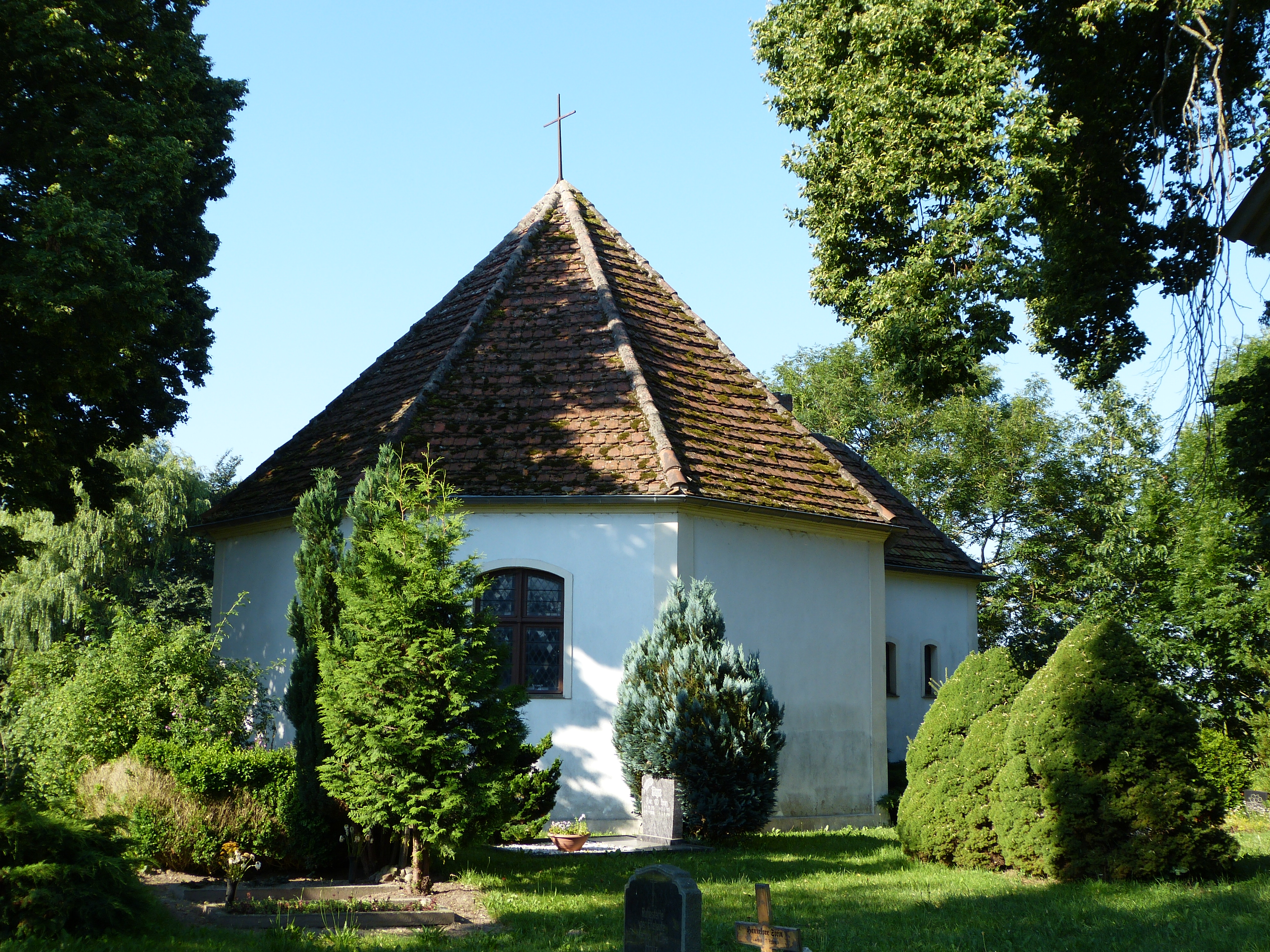 Kapelle in Düvier, Ansicht von Nordosten